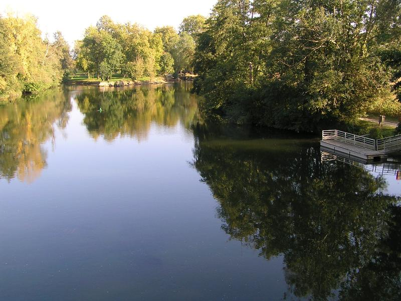 Fleuve Charente en amont de Cognac